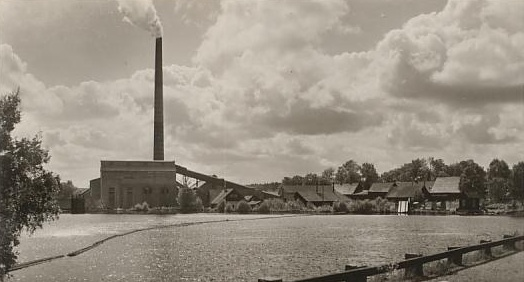 Delary sulfatfabrik i början av 1940-talet Foto efter gammalt vykort